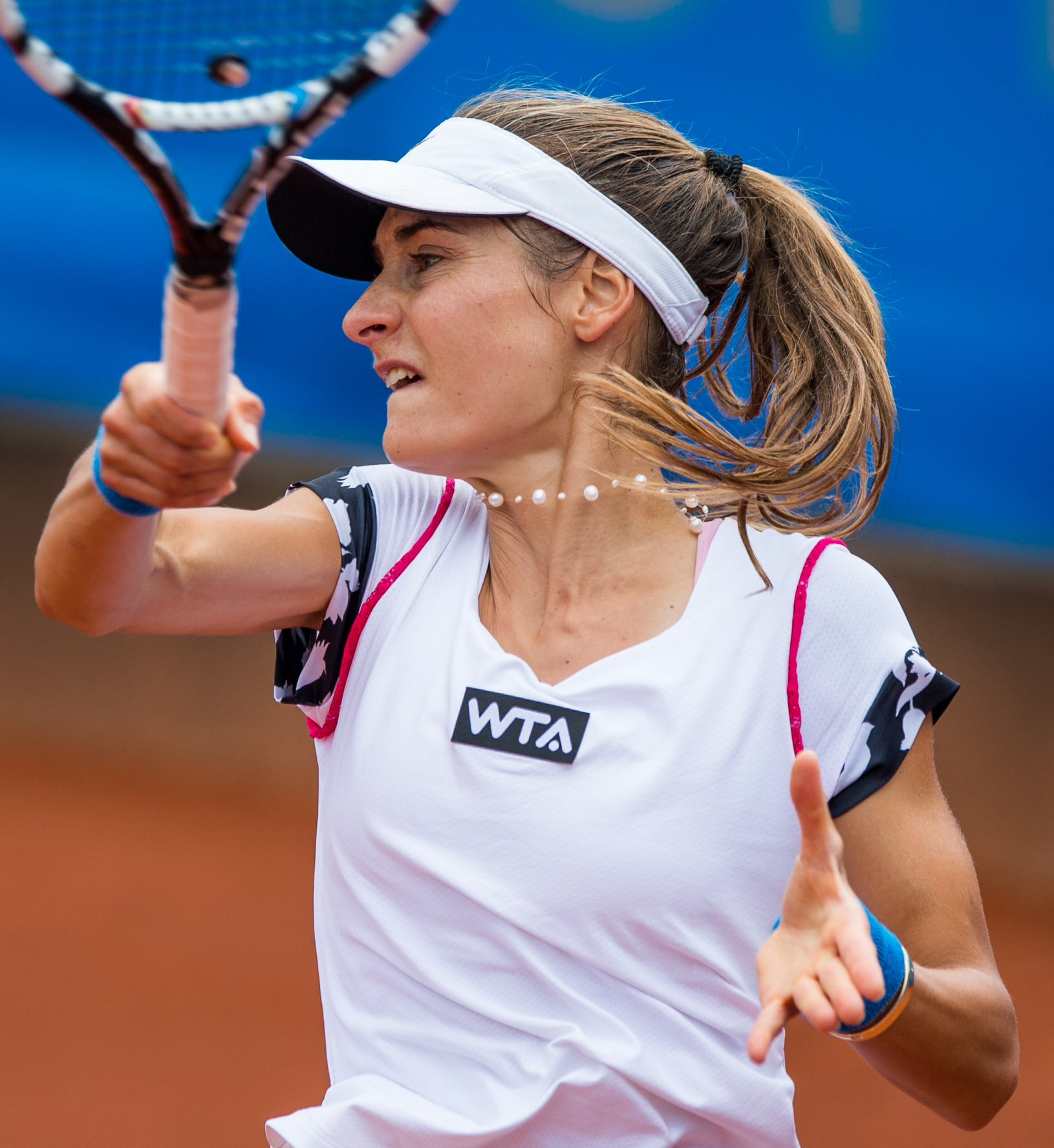 Damentennis,Dia Evtimova,Nürnberger Versicherungscup 2014,Tennis,WTA, Диа Евтимова